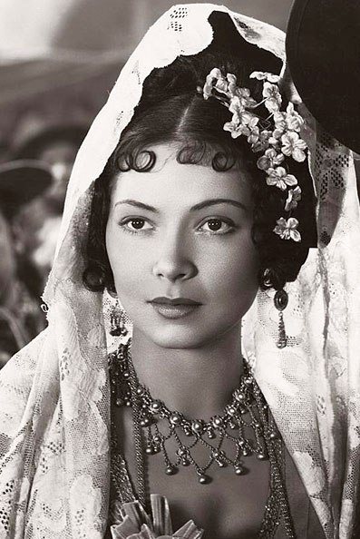 Steffi Duna a "Dancig Pirate" című filmben.